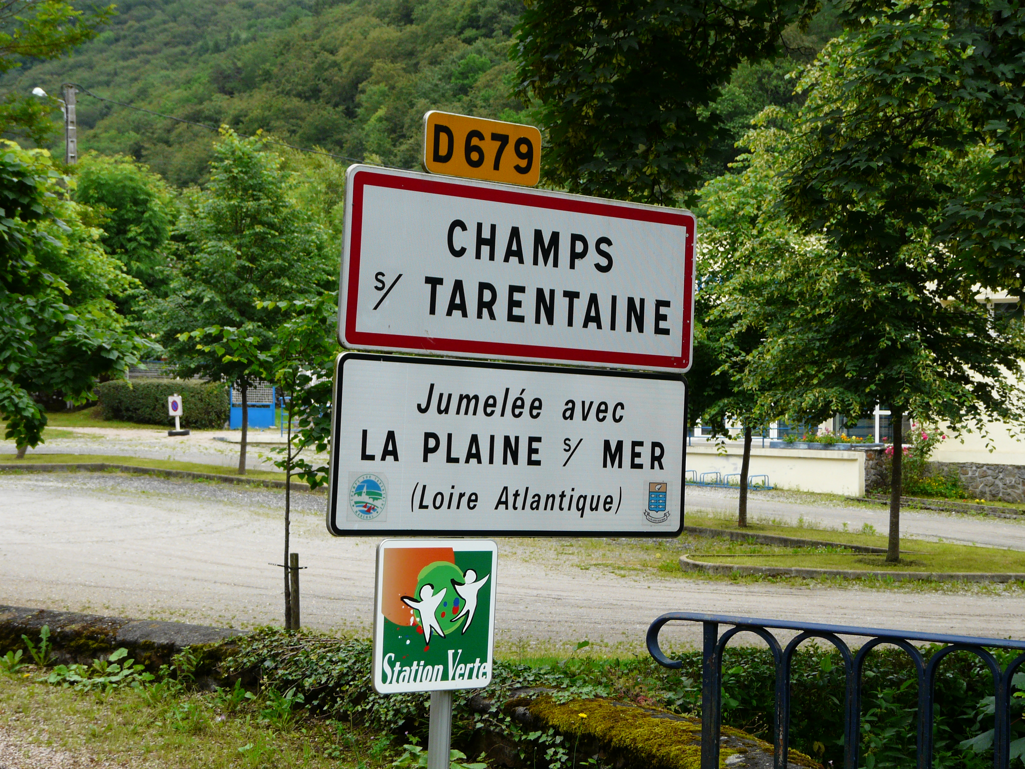 Panneau de jumelage de Champs-sur-Tarentaine-Marchal, Cantal, France.